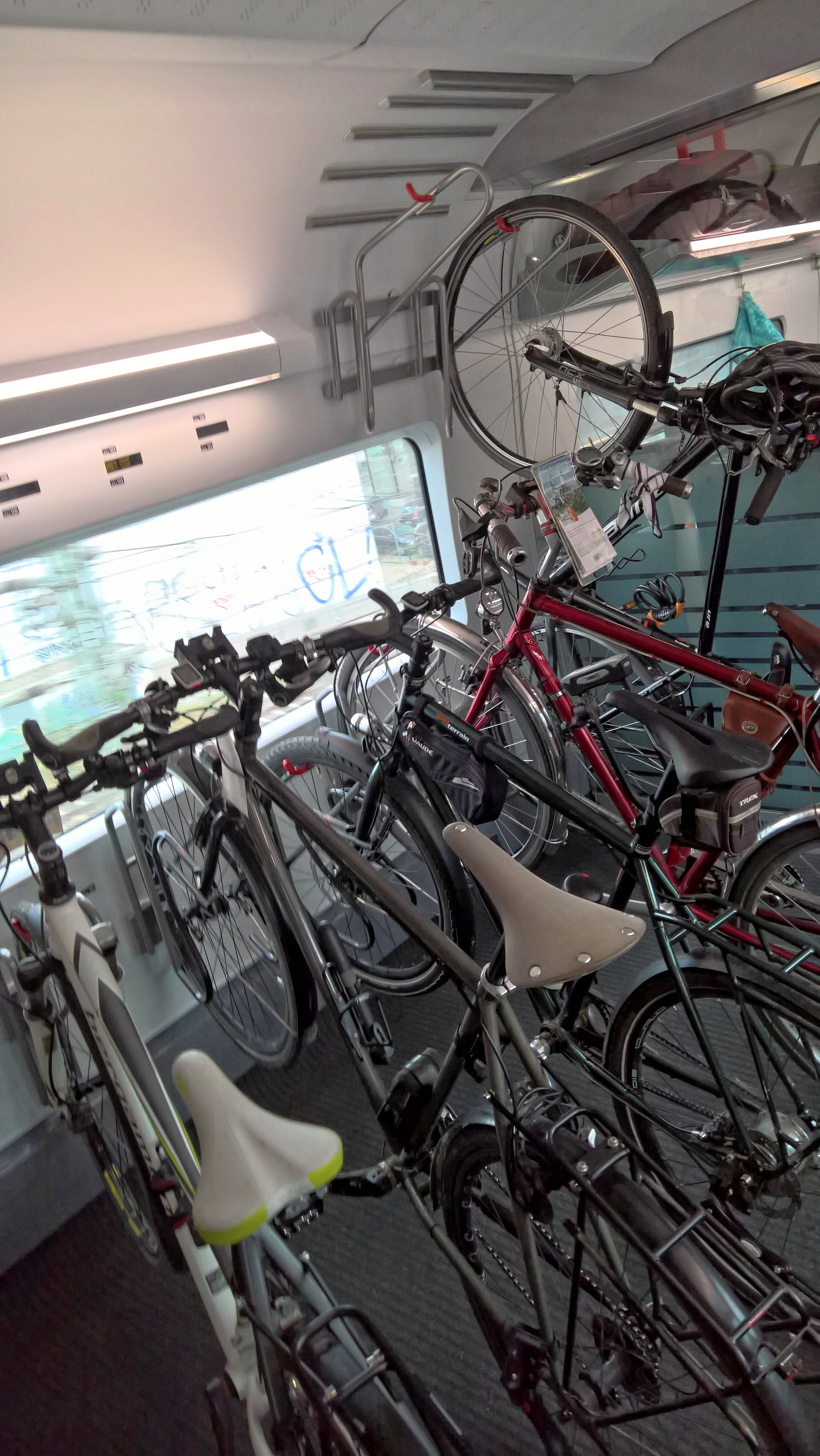 verschiedenen Bilder 2018